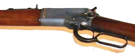 Winchester92 Gehäuse